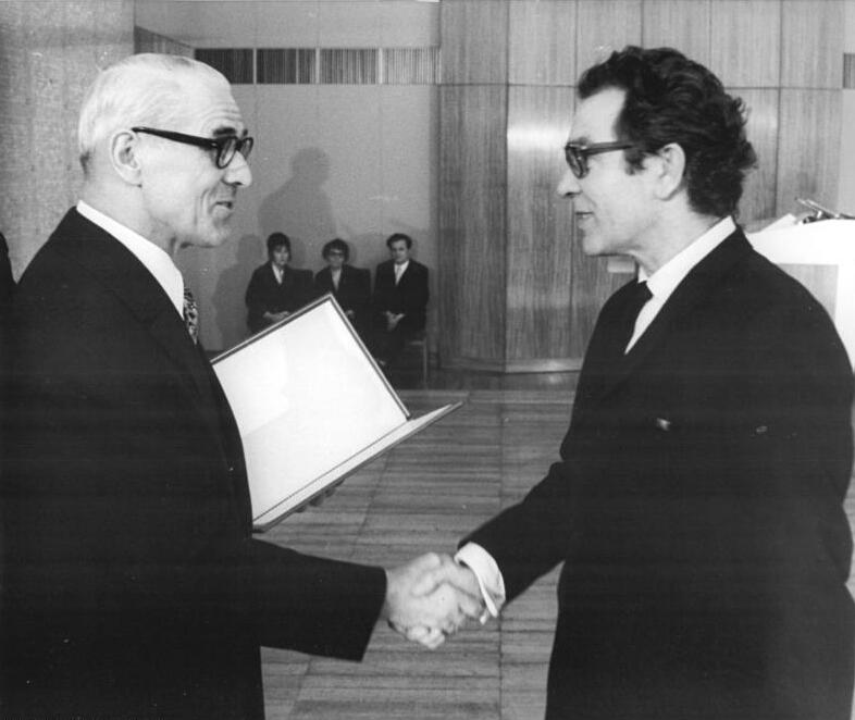 Berlin, Nationalpreis an Benno Besson ADN-ZB Deutsche Demokratische Republik 4.10.1974 Staatliche Auszeichnungen zum 25. Jahrestag der DDR. Der Regisseur René Benjamin Besson (rechts) wurde am 4.10.1974 mit dem Nationalpreis II. Klasse für Kunst und Literatur ausgezeichnet (unser Foto). Während einer festlichen Veranstaltung im Amtssitz des Staatsrates der DDR in Berlin nahm Willi Stoph die Auszeichnungen vor, die auf Vorschlag des Politbüros des ZK der SED und des Präsidiums des Ministerrates der DDR anläßlich des 25. Jahrestages der Gründung der Deutschen Demokratischen Republik erfolgten. Abgebildete Personen: Besson, Benno: Theaterregisseur, Schweiz (GND 118662597) Stoph, Willi: Ministerpräsident, Staatsratsvorsitzender, Armeegeneral, SED, DDR (GND 118975714)